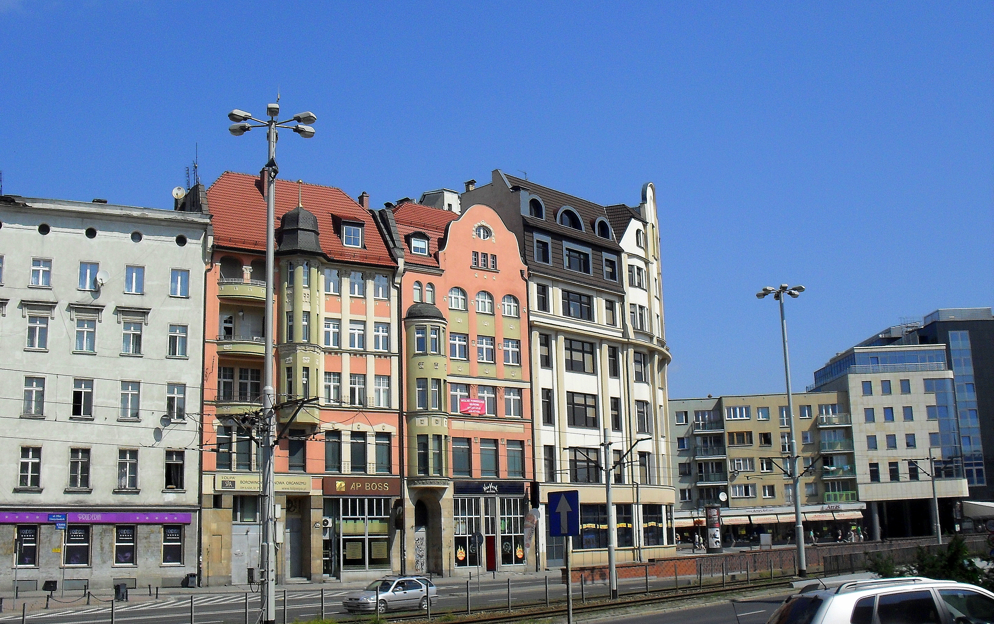 Wrocław, ul. Kazimierza Wielkiego, Trasa W - Z